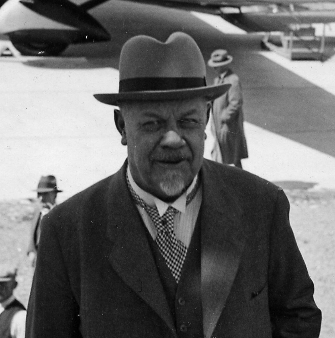 Aiempi ministeri, Suomen Oslon lähettiläs Wäinö Wuolijoki vuonna 1937.